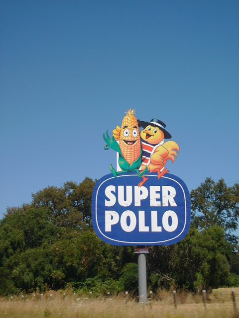 Letrero publicitario de la empresa chilena Super Pollo en la Carretera Panamericana.